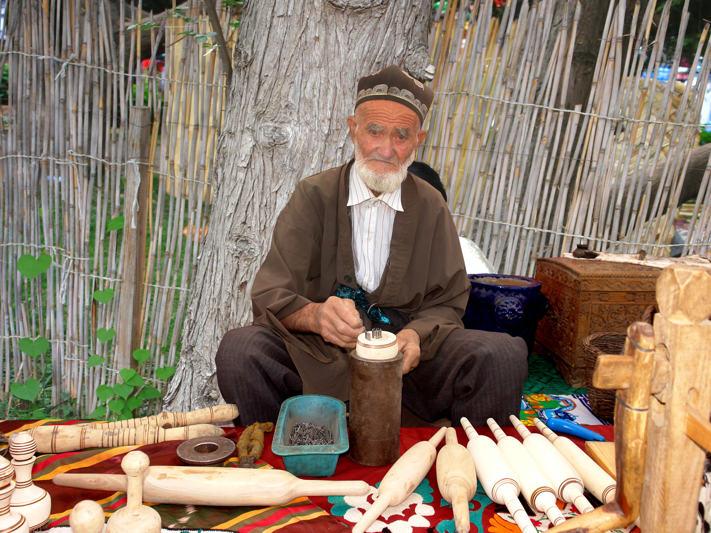 Старик-ремесленник во время работы (Гиссар, Таджикистан) Тоҷикӣ: Мӯйсафед-косиб ҳангоми кор (Ҳисор, Тоҷикистон)